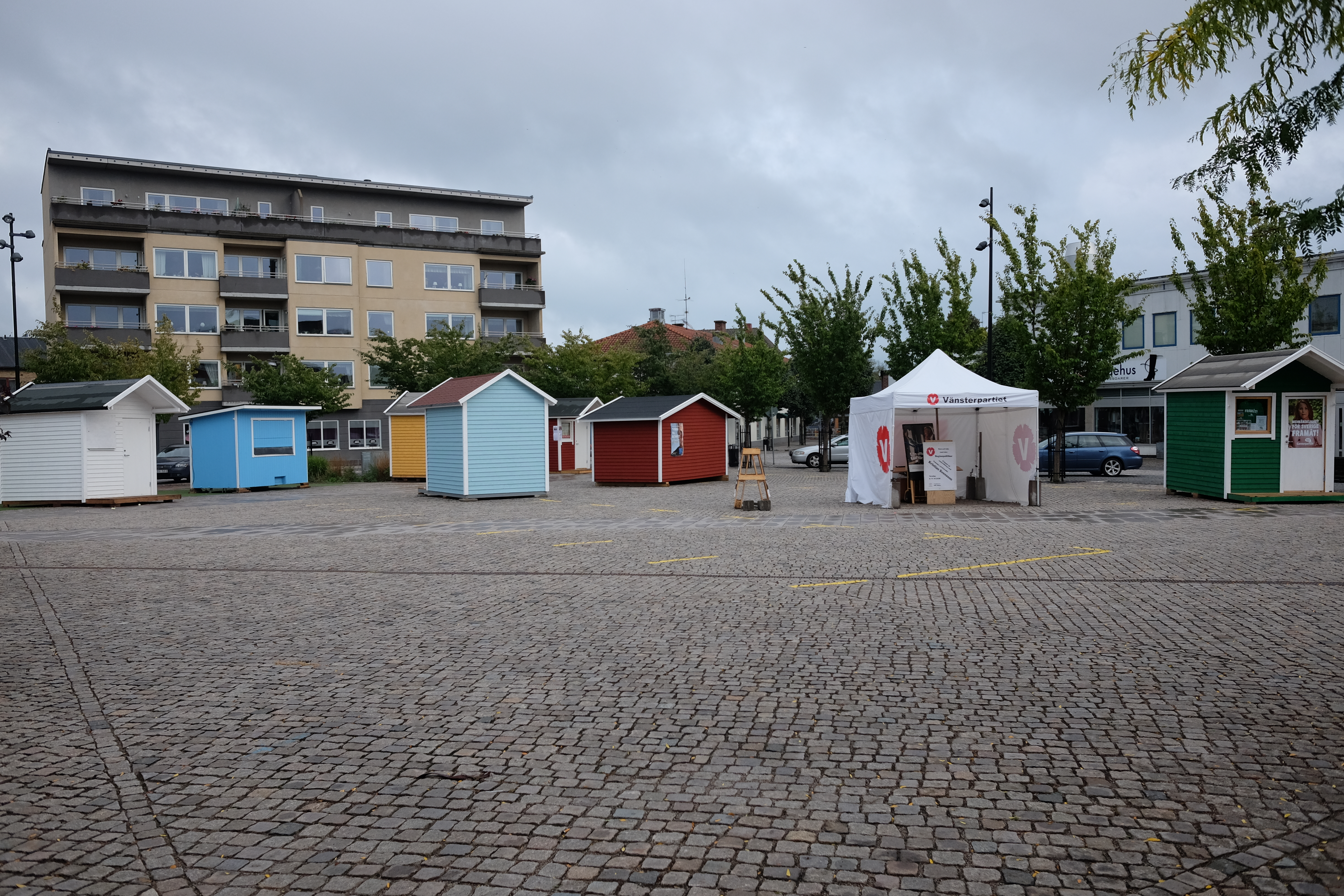 Valstugor på Nya torg i Hörby 2018-08-27.